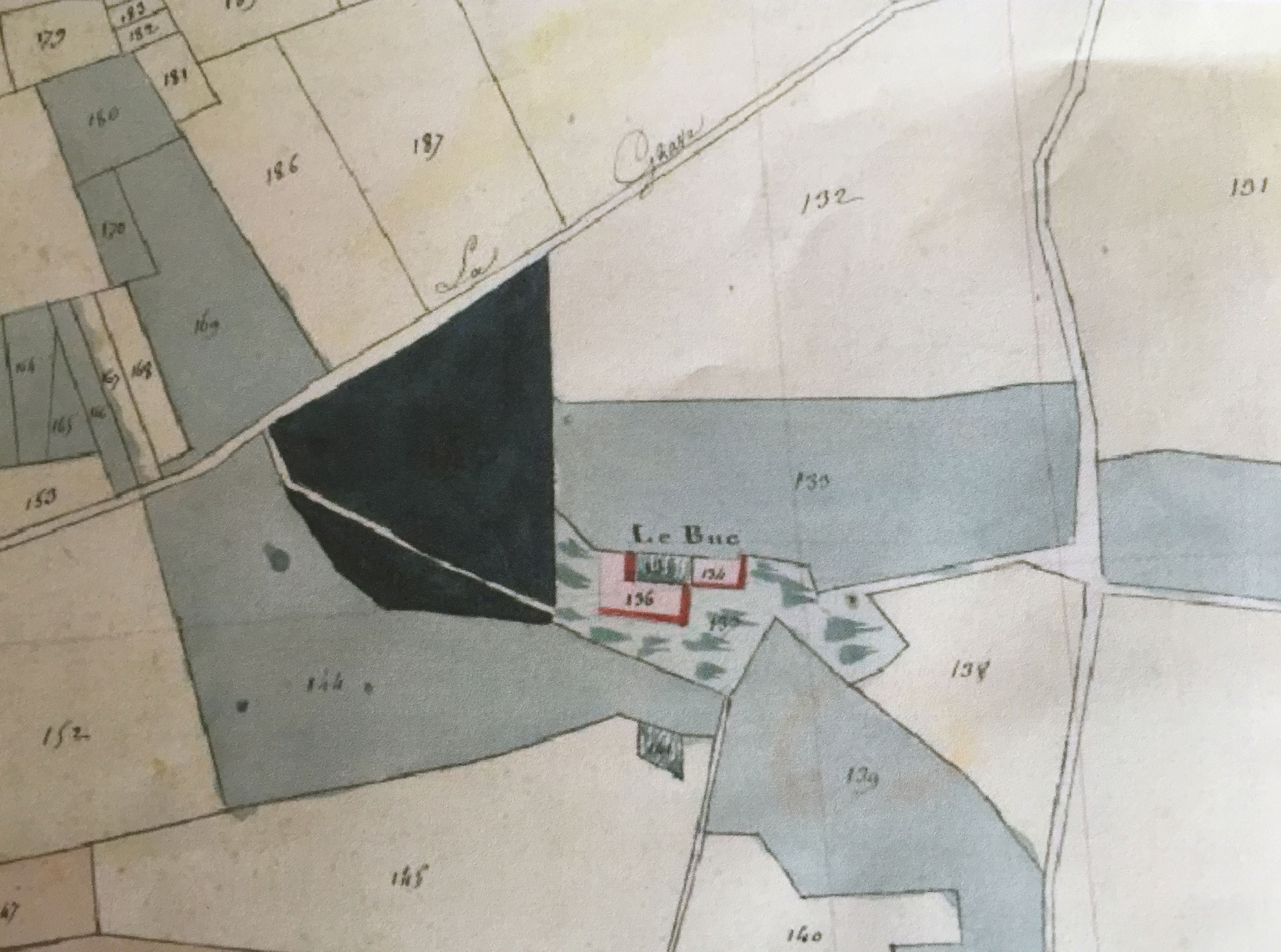 Plan du Domaine du Buc au XIXeme